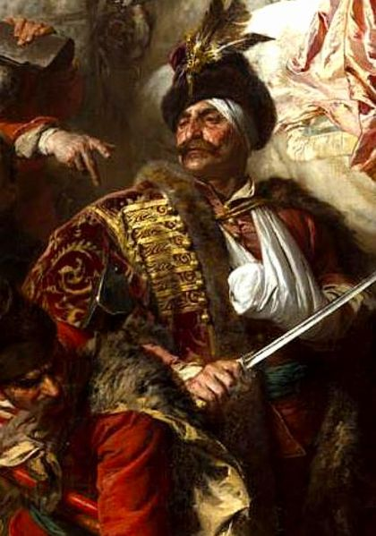 Petneházy Dávid hajdúkapitány